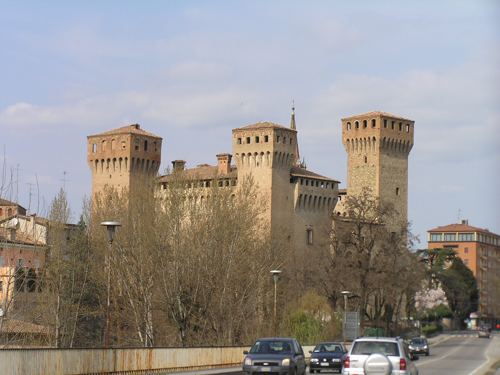 Castello medievale di Vignola, Modena.